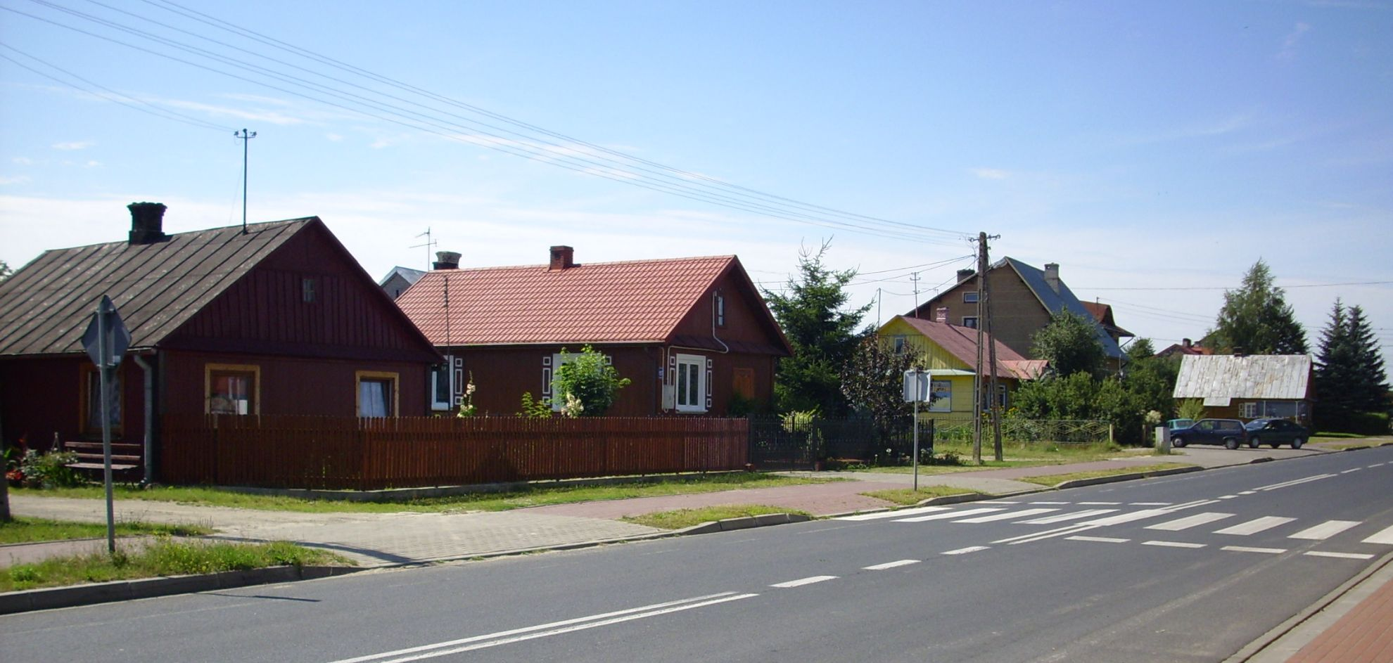 Stara Kornica. Typowa zabudowa.